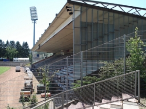 Bilddatei von der Entega-Tribüne im Stadion am Böllenfalltor